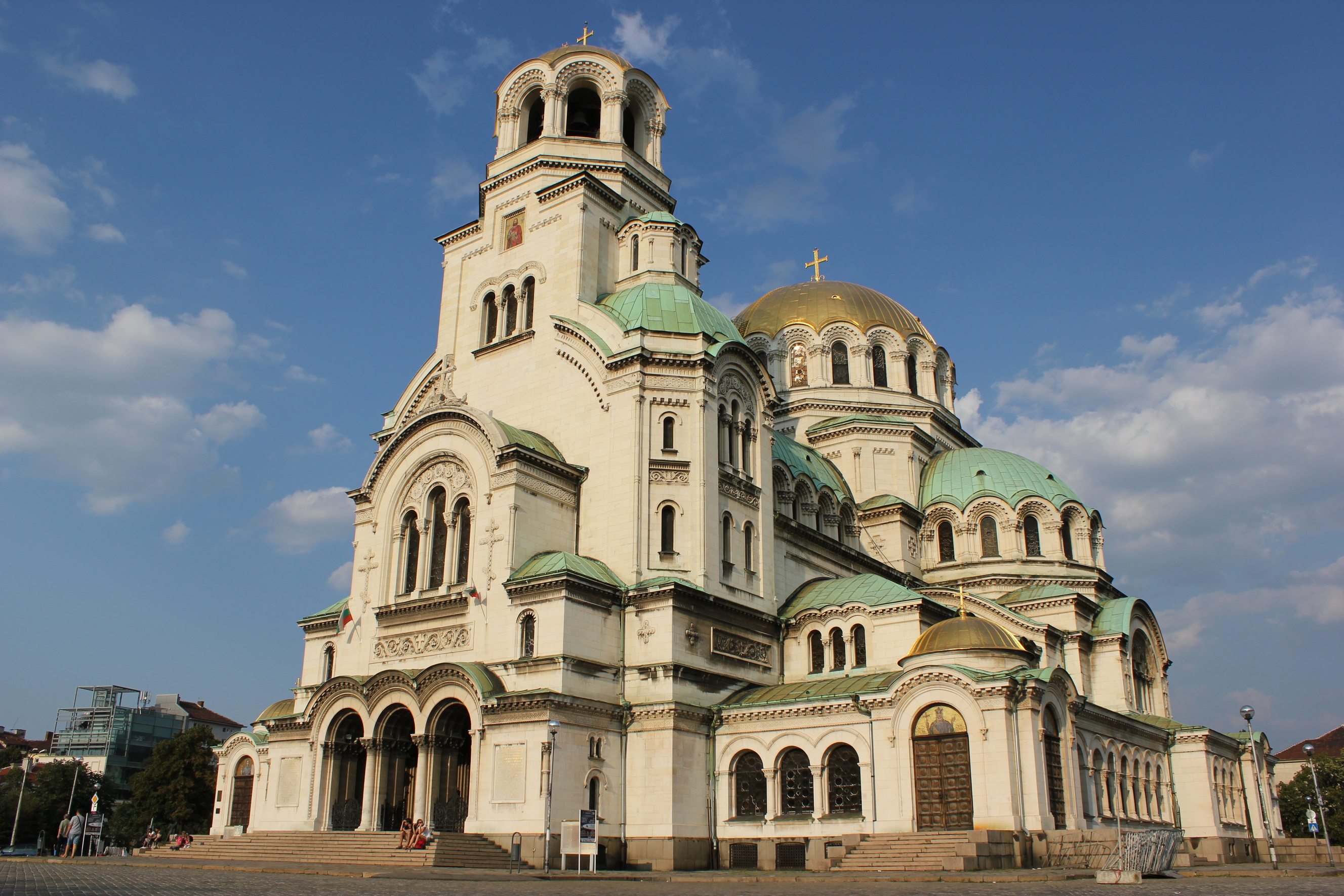 Hornjoserbsce: Katedrala Aleksandra Newskeho w Sofiji.